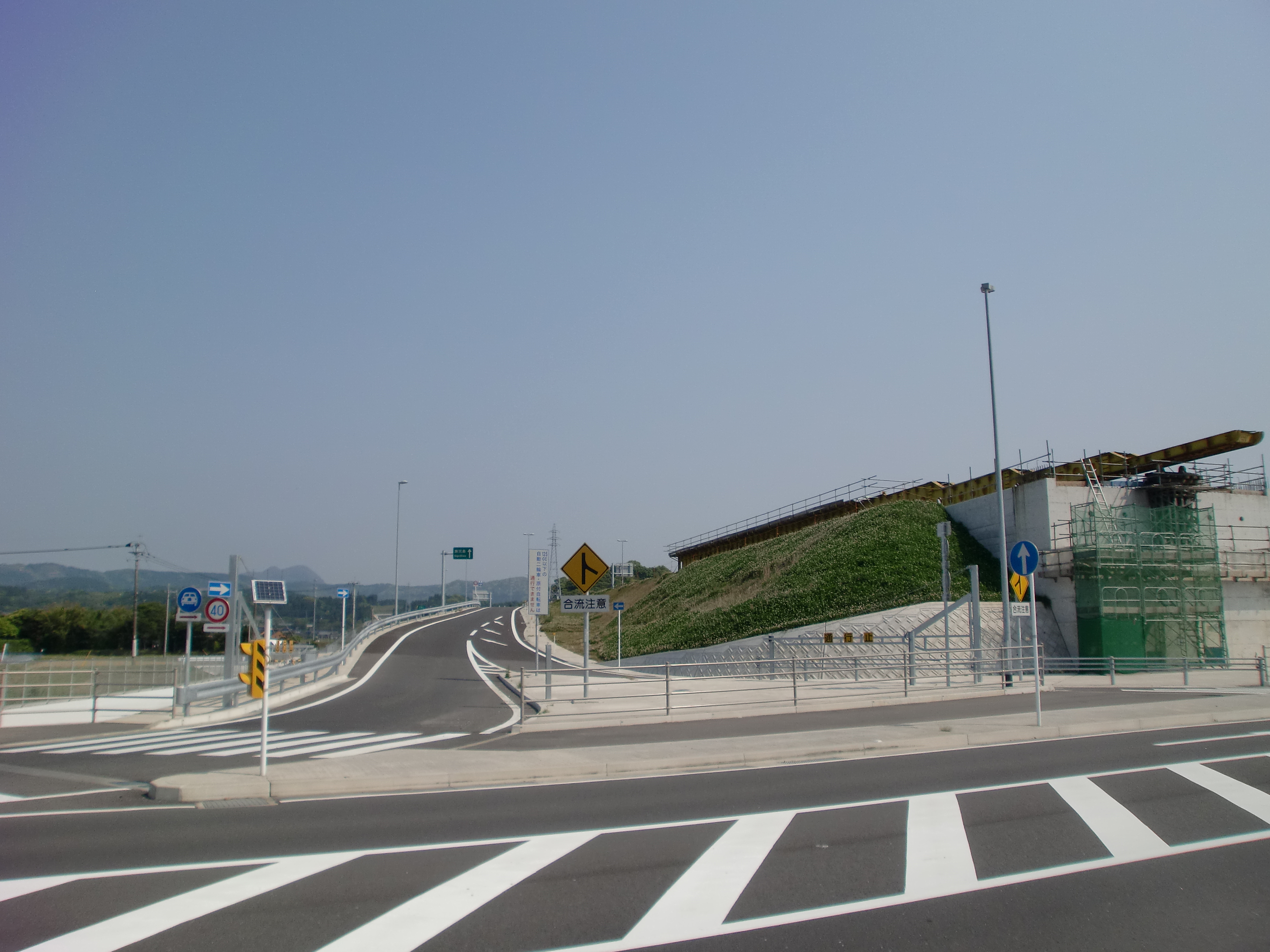 南薩縦貫道の南九州川辺インターチェンジ（鹿児島方面出入口）。